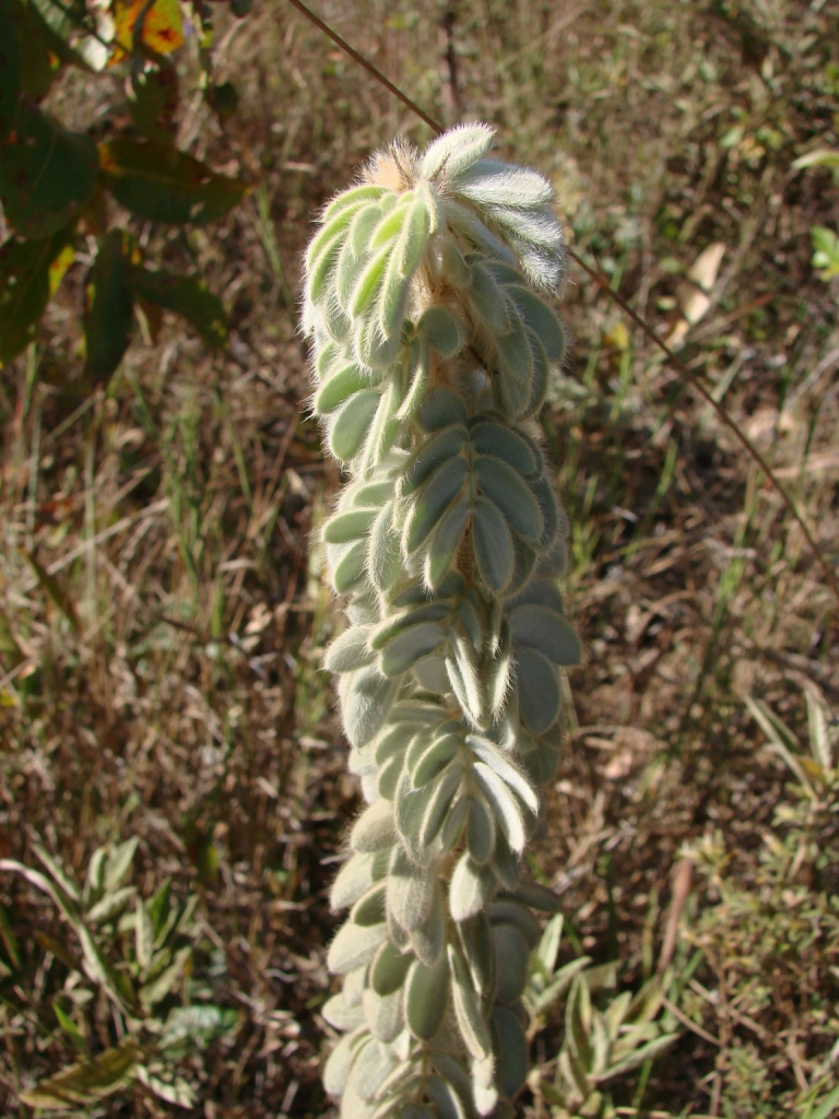 Mimosa lanuginosa Glaz. ex Burkart - FABACEAE - Parque Ecológico Dom Bosco - Brasília - Distrito Federal - Brasil.